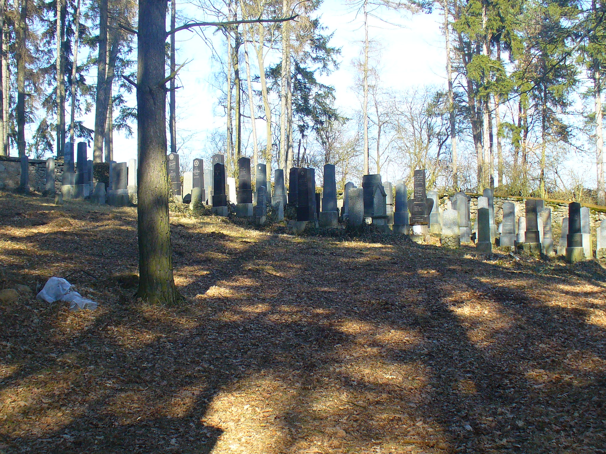 Židovský hřbitov v Kovářově.